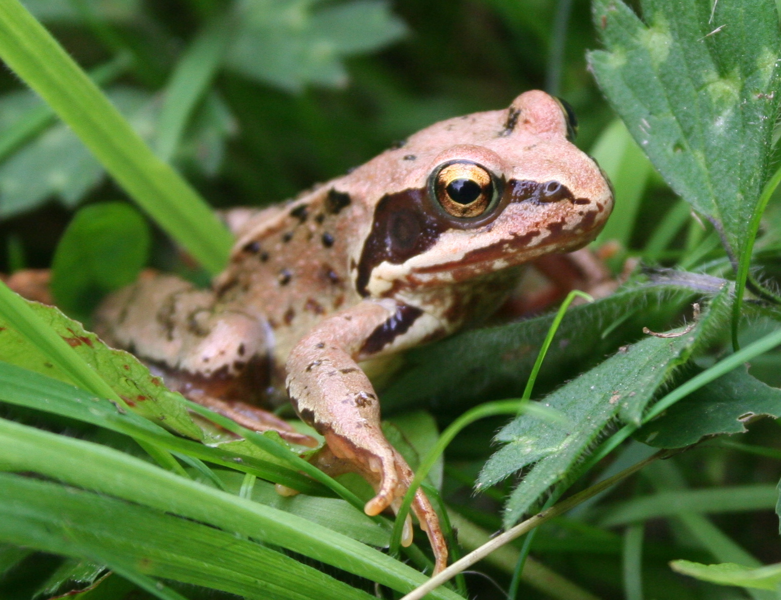 Common Frog (Rana temporaria)